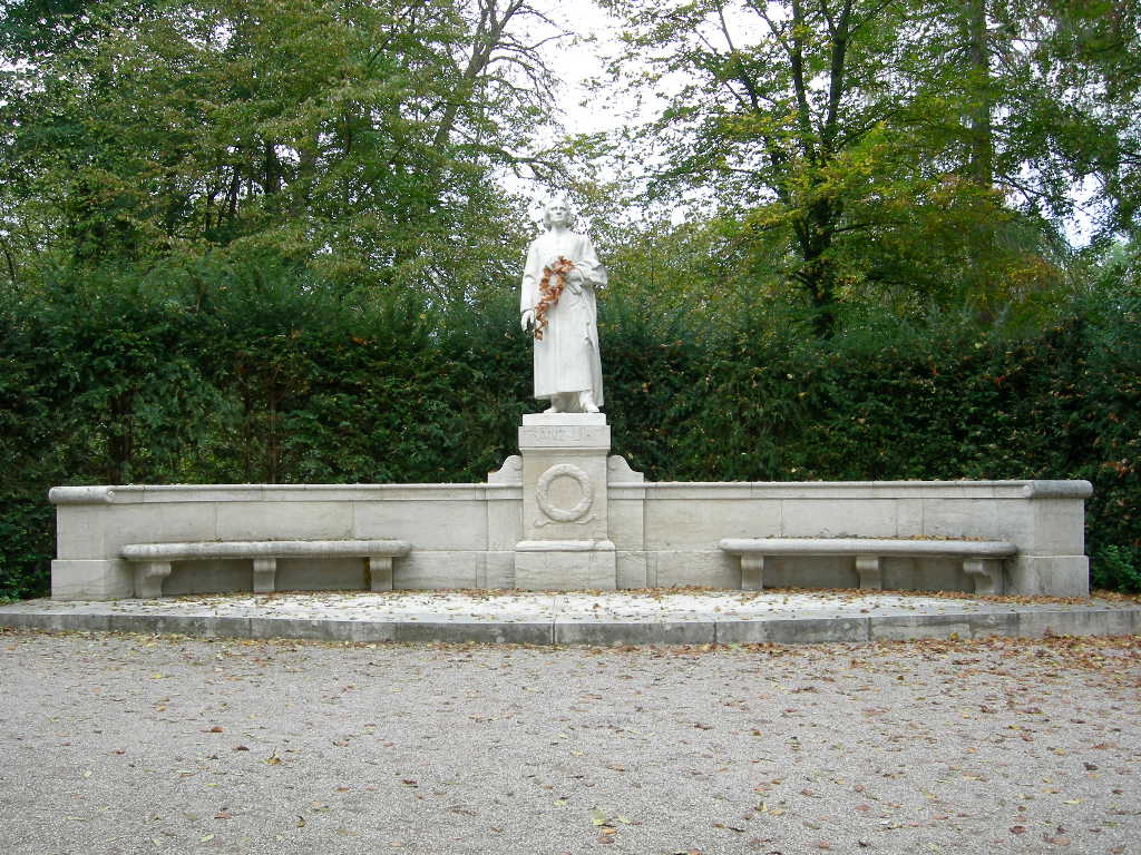 Liszt Ferenc szobra a parkban